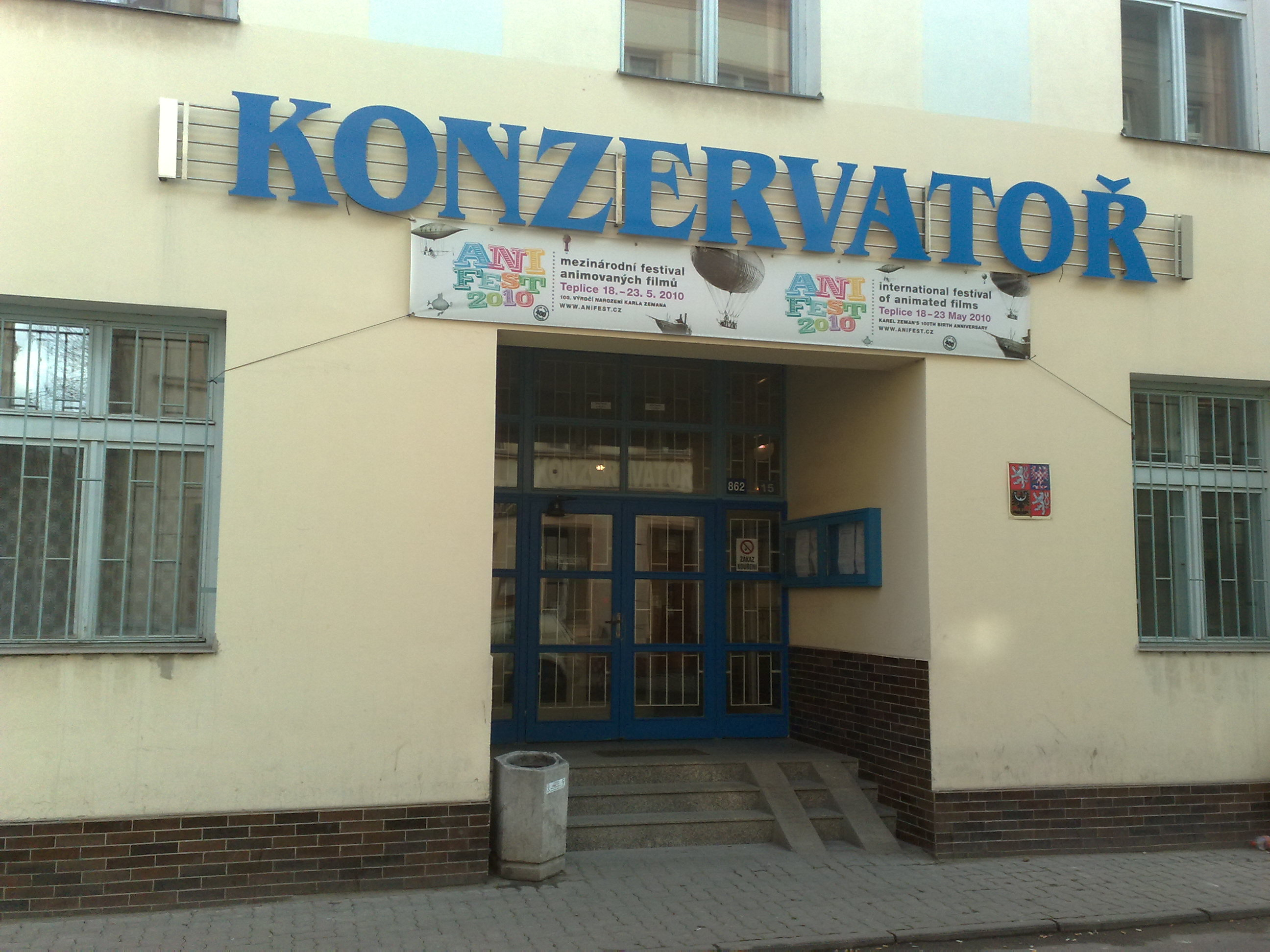 Tento ročník proběhl v rozmezí dní 18. - 23. 5. 2010. Plakát na budově Teplické Konzervatoře.